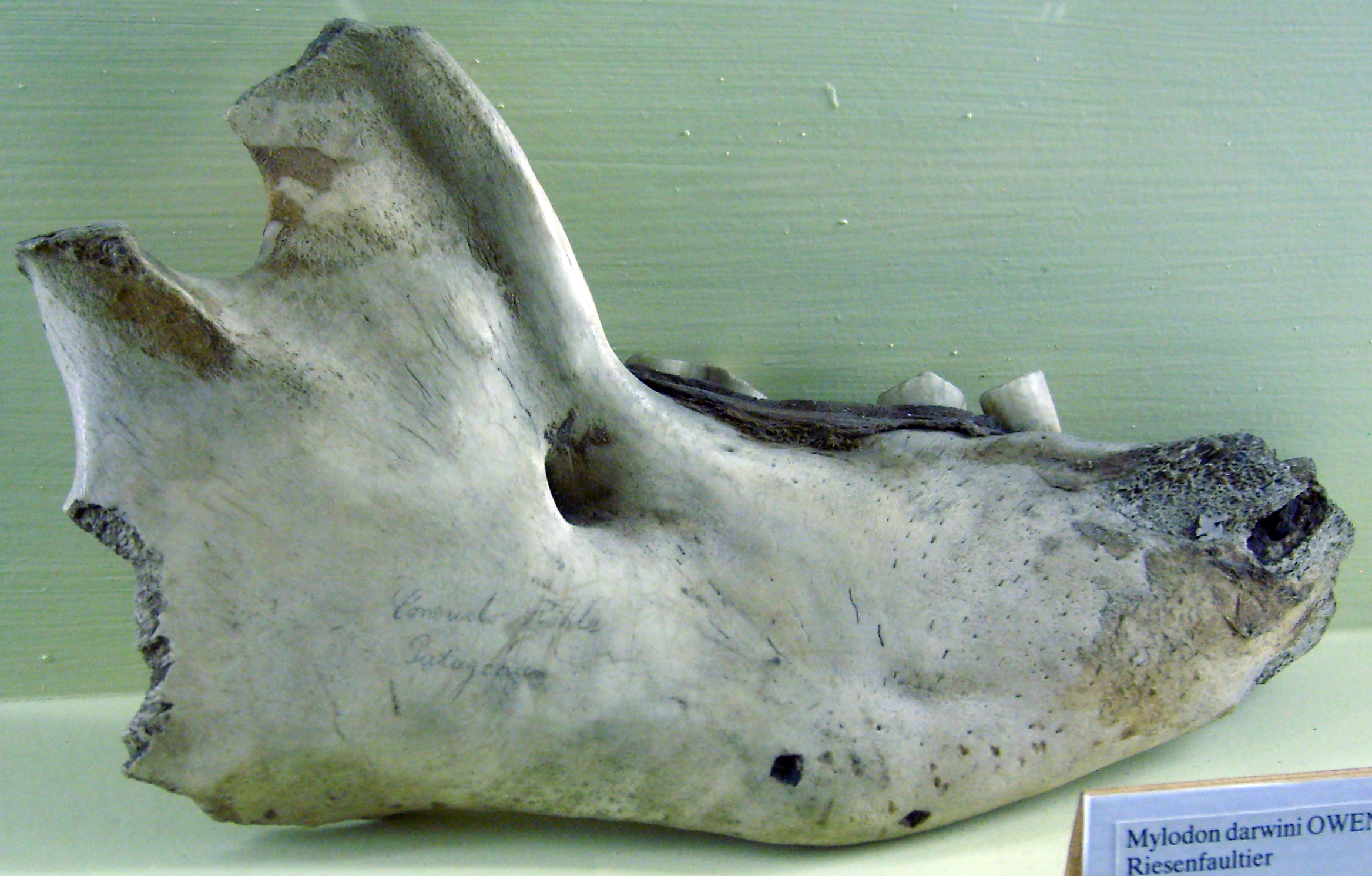 Mylodon darwini lower jaw at the Museum für Naturkunde, Berlin.